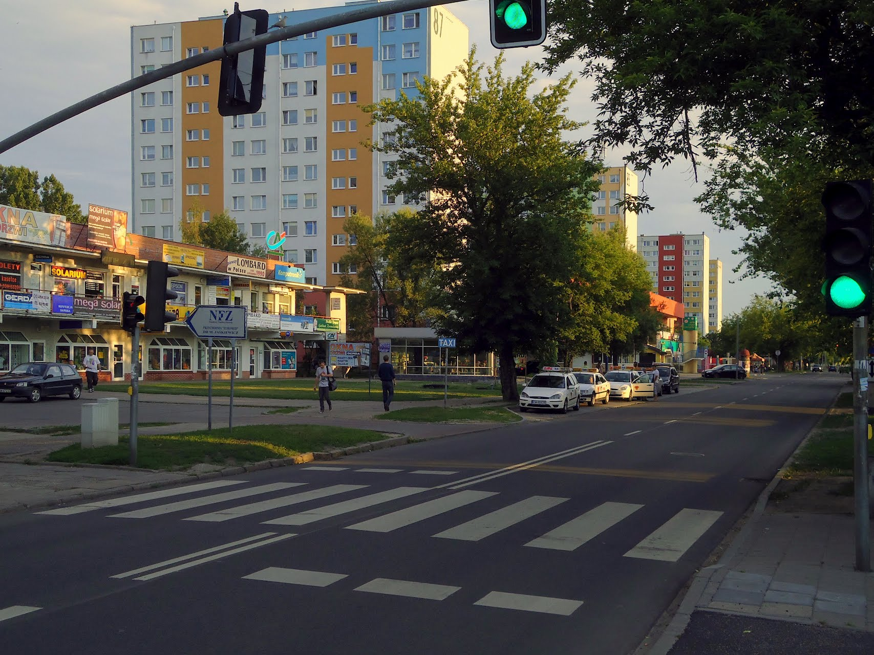 Włocławek - główna ulica osiedla Południe - Kaliska